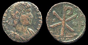 ChiRho auf alter römischer Münze